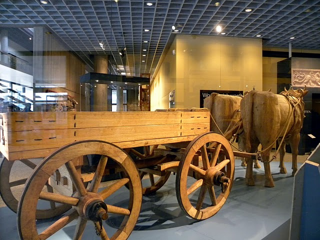 Koln